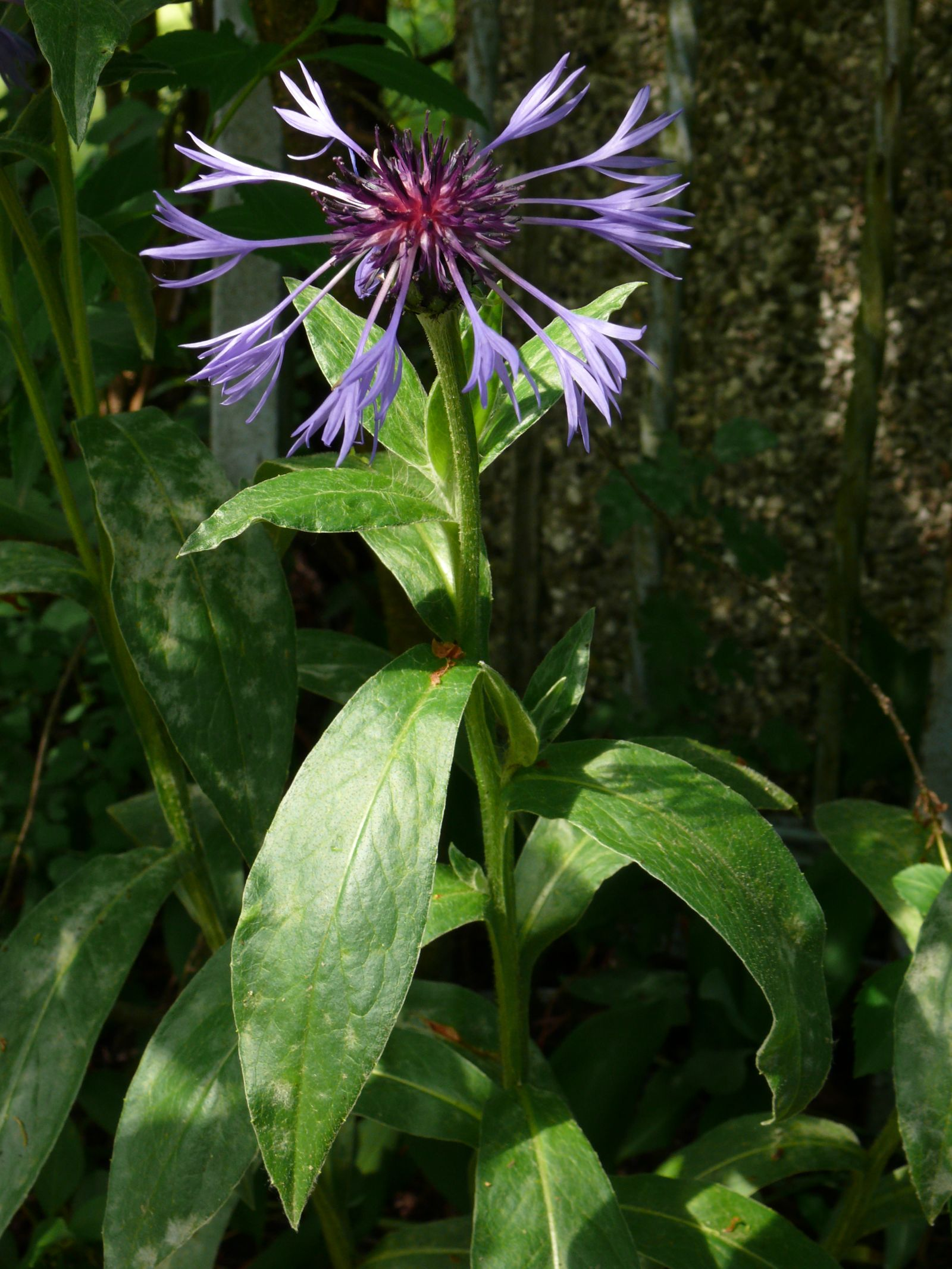 Centaurea montana, garden refugee, Hamburg, Germany